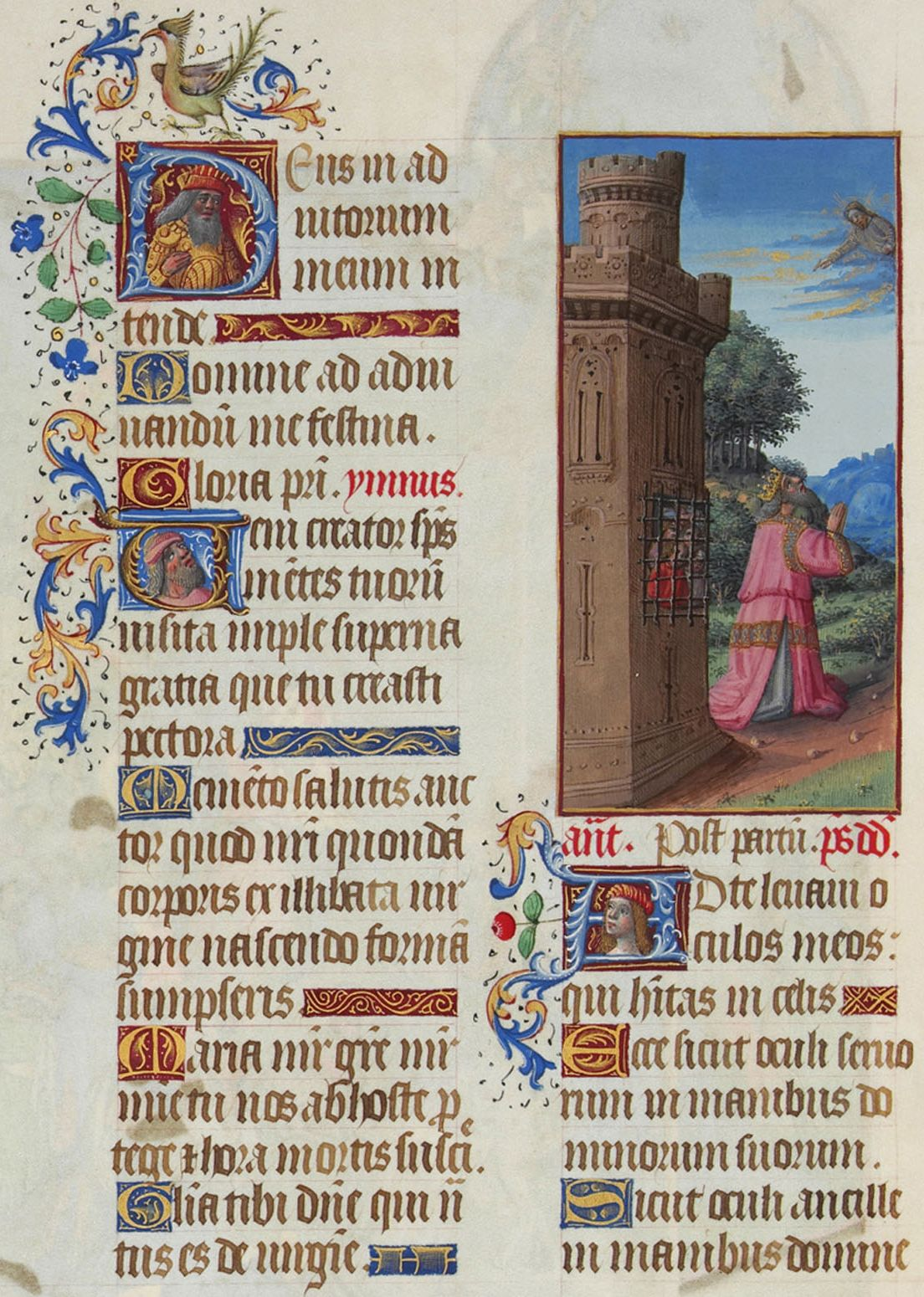 David en prière dans un jardin et au pied d'une tour, Dieu se présentant à lui parmi les nuages